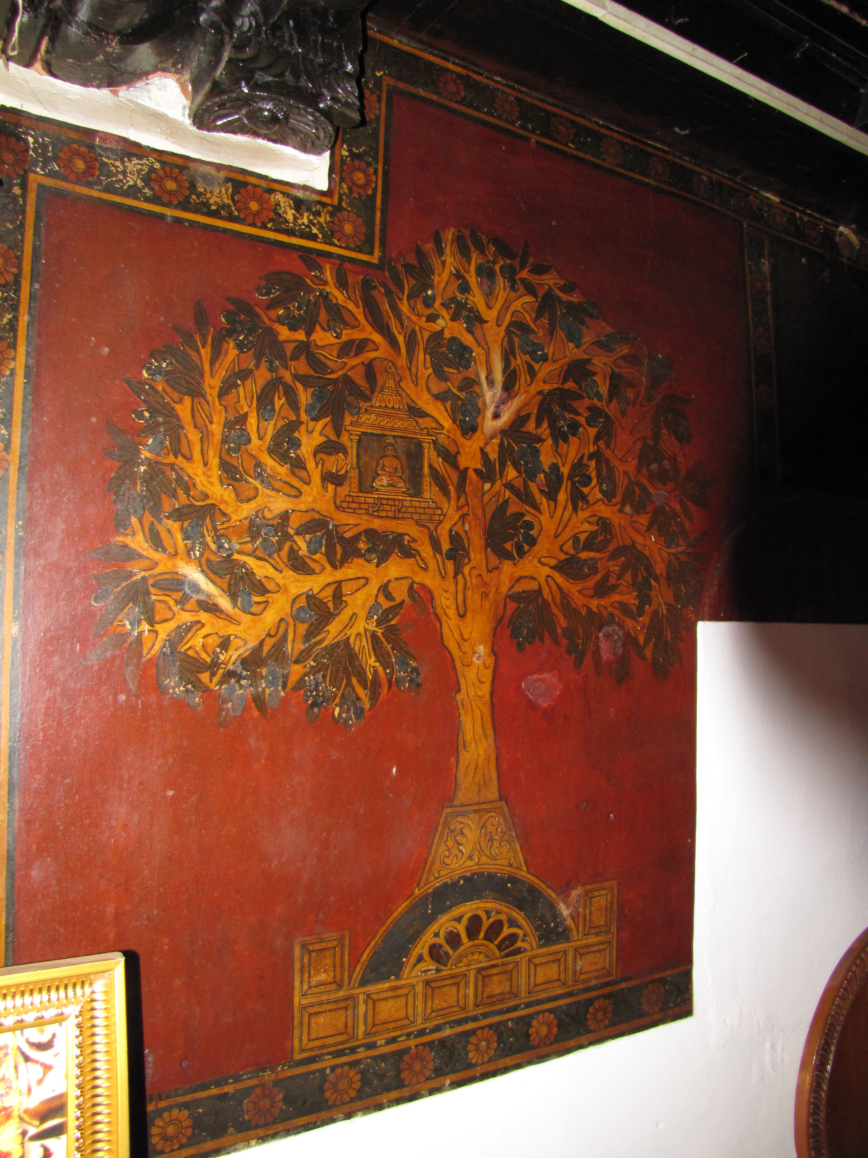 The wall painting of Kalpavruksha in Jain Basadi, Moodbidri, Karnataka